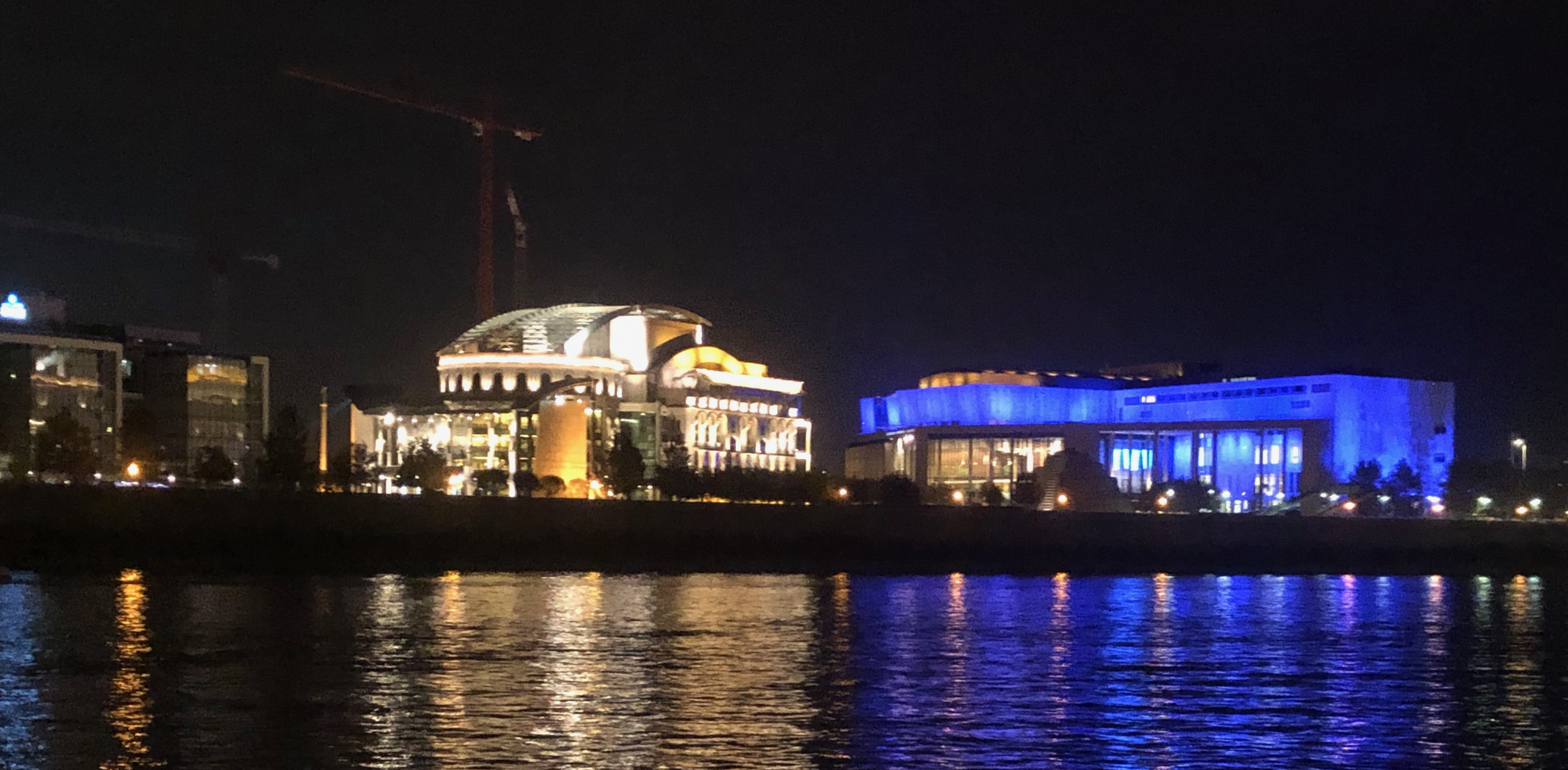 Национальный театр